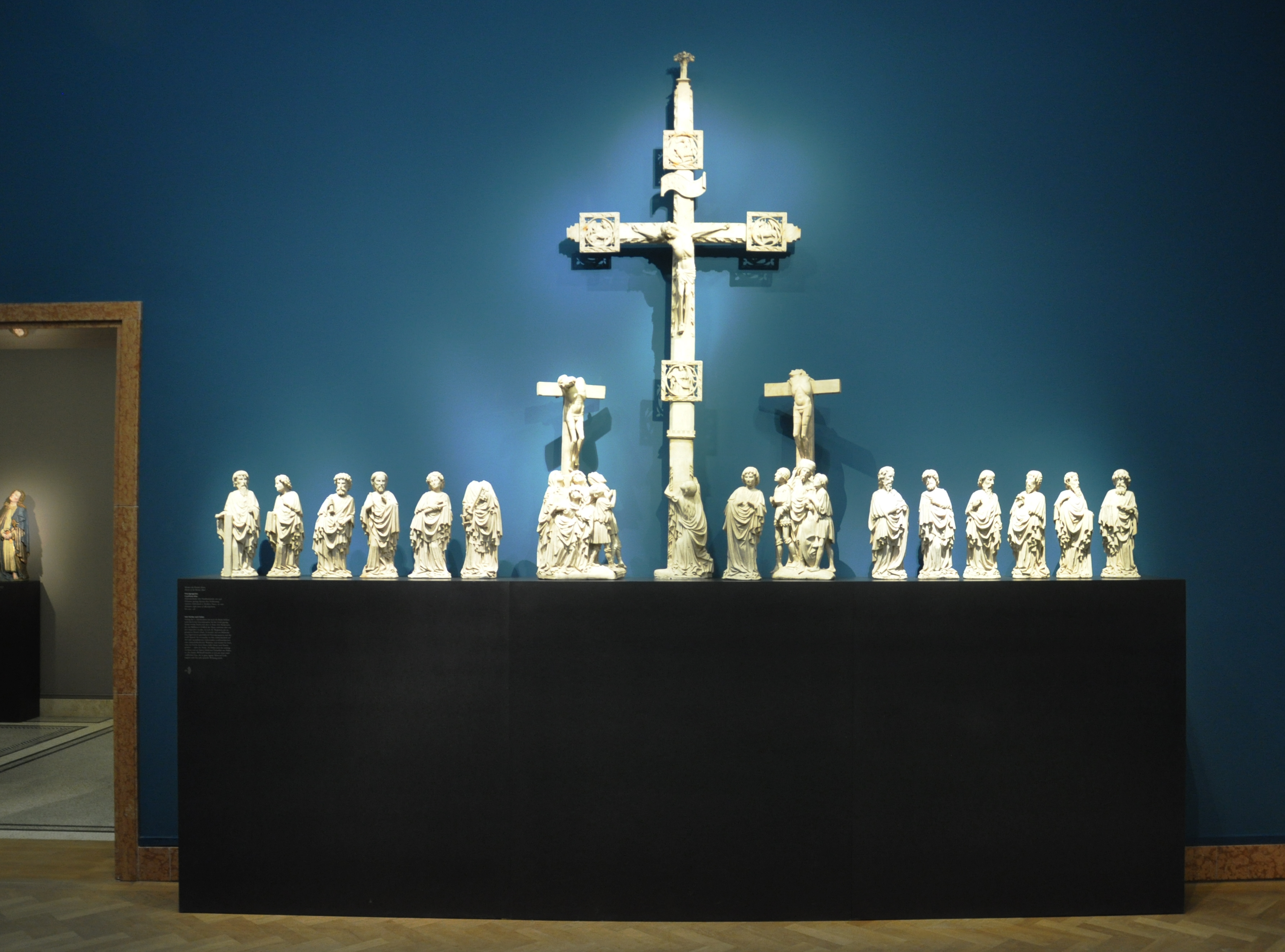 Meister des Rimini-Altars: Kreuzigungsaltar aus Rimini (Rimini-Altar); Südniederlande oder Nordfrankreich, um 1430; Alabaster, geringe Reste alter Fassung Liebieghaus, Frankfurt am Main, Inv. Nr. 400–418; Weblink